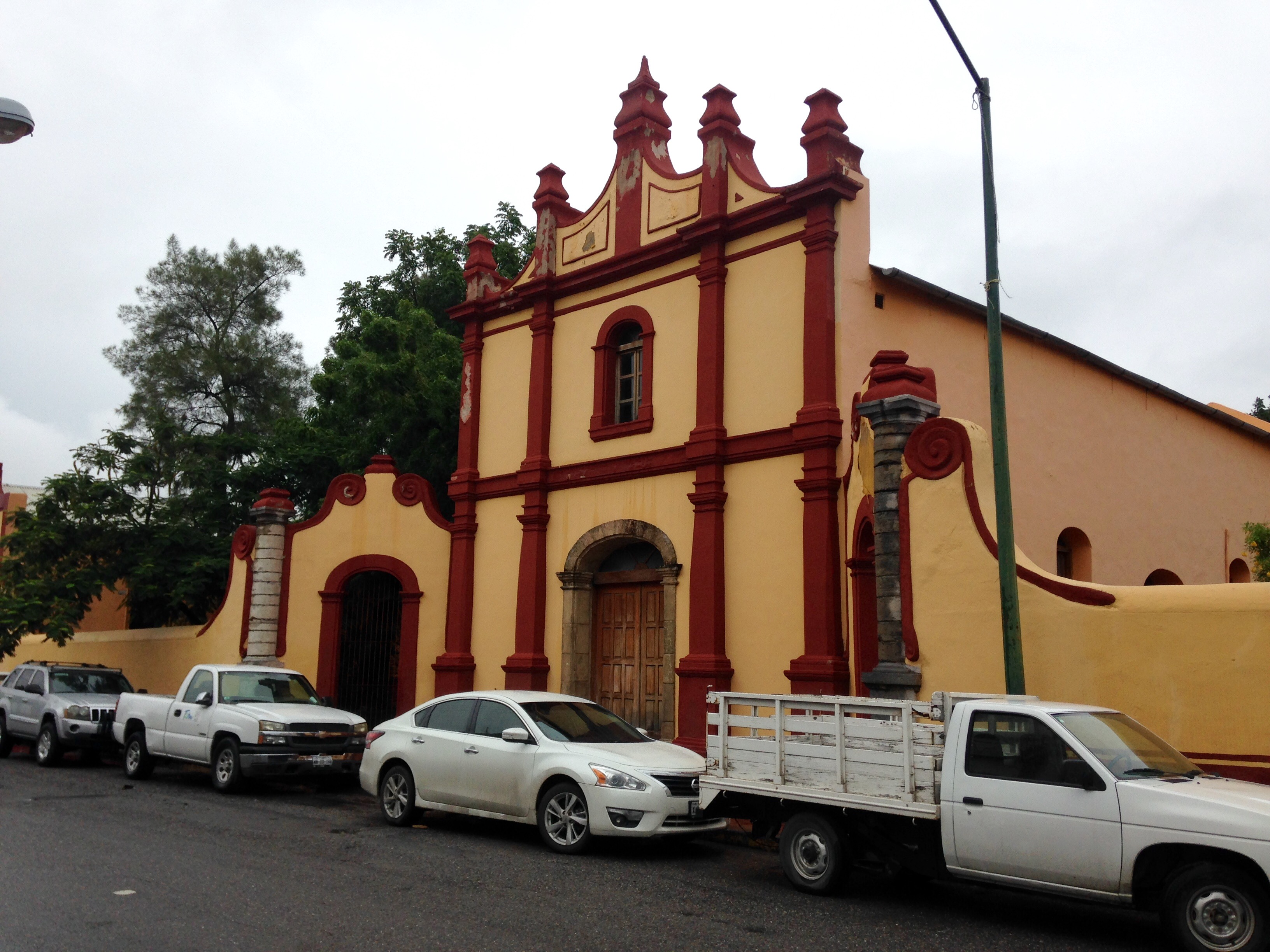 Vista de fachada desde calle del Museo Regional de Historia de Tamaulipas en Ciudad Victoria, México.